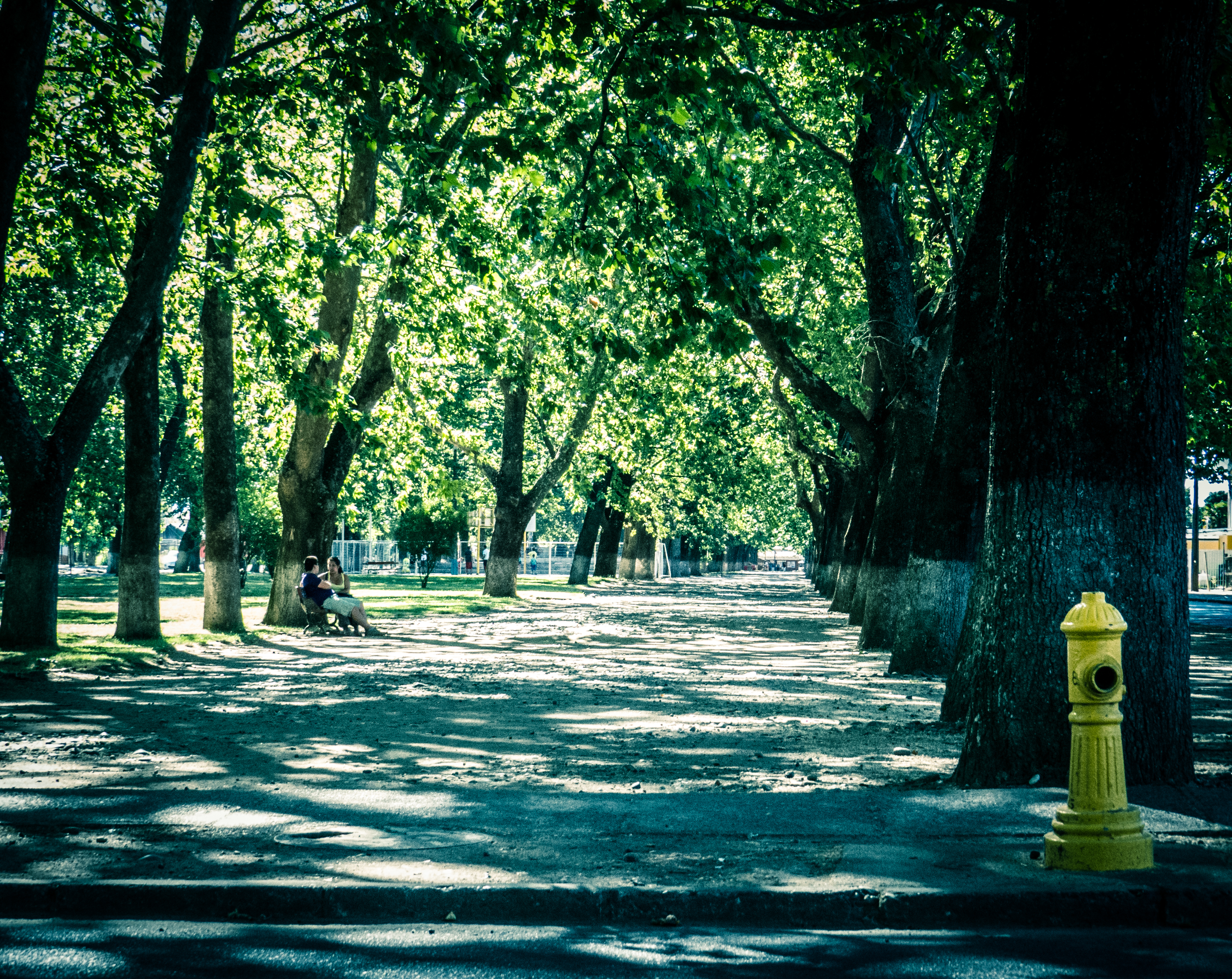 Imagen de la alameda de Parral